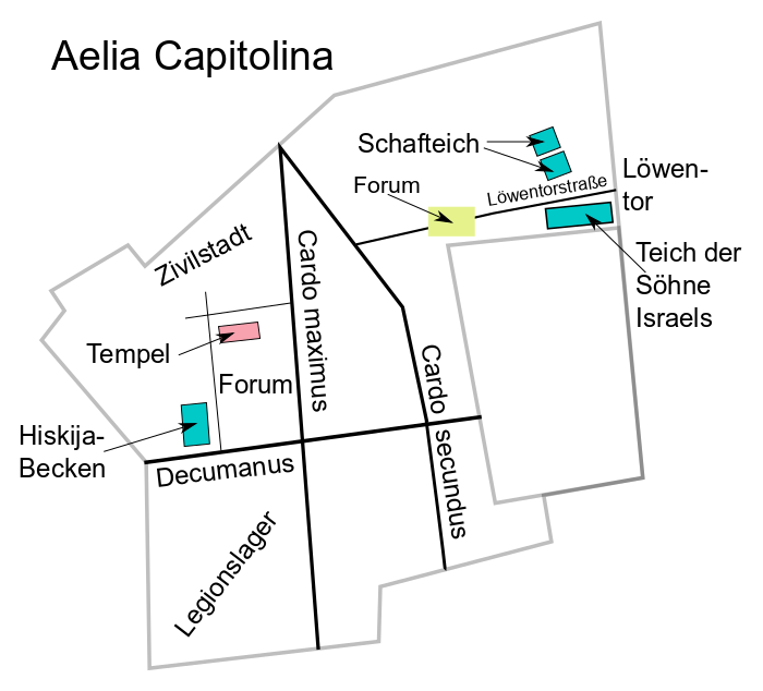 Aelia Capitolina, Skizze